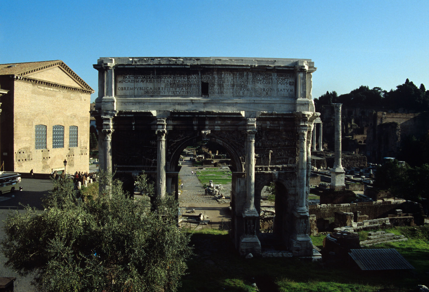 Foro romano nel 1986